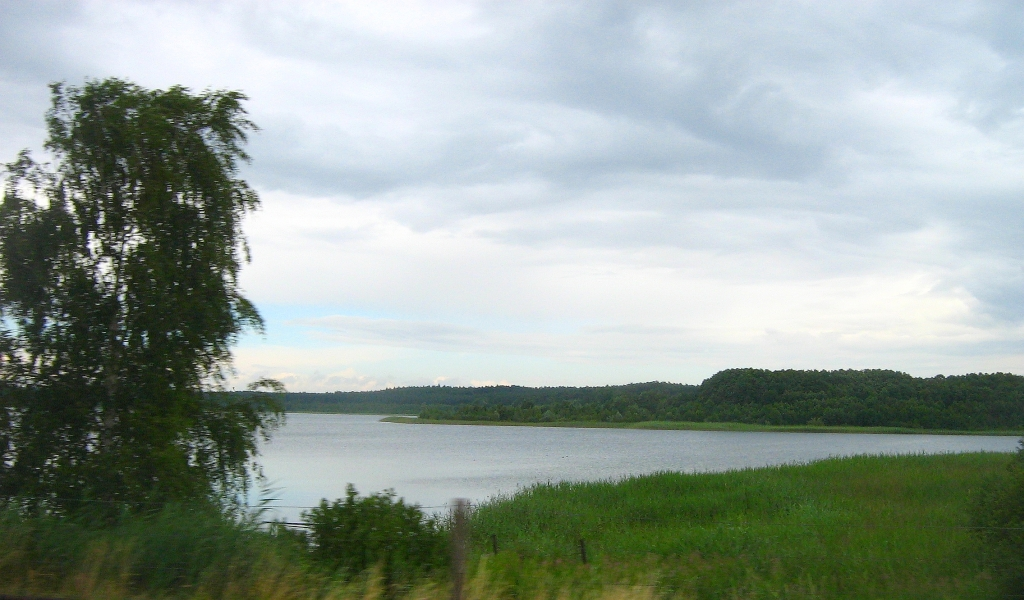 Der Alt Schweriner See (auch Drewitzer See genannt) nordöstlich des Dorfes Alt Schwerin im Landkreis Müritz (Mecklenburg-Vorpommern). Aus dem fahrenden Auto von der Autobahn A19 aus geknipst.